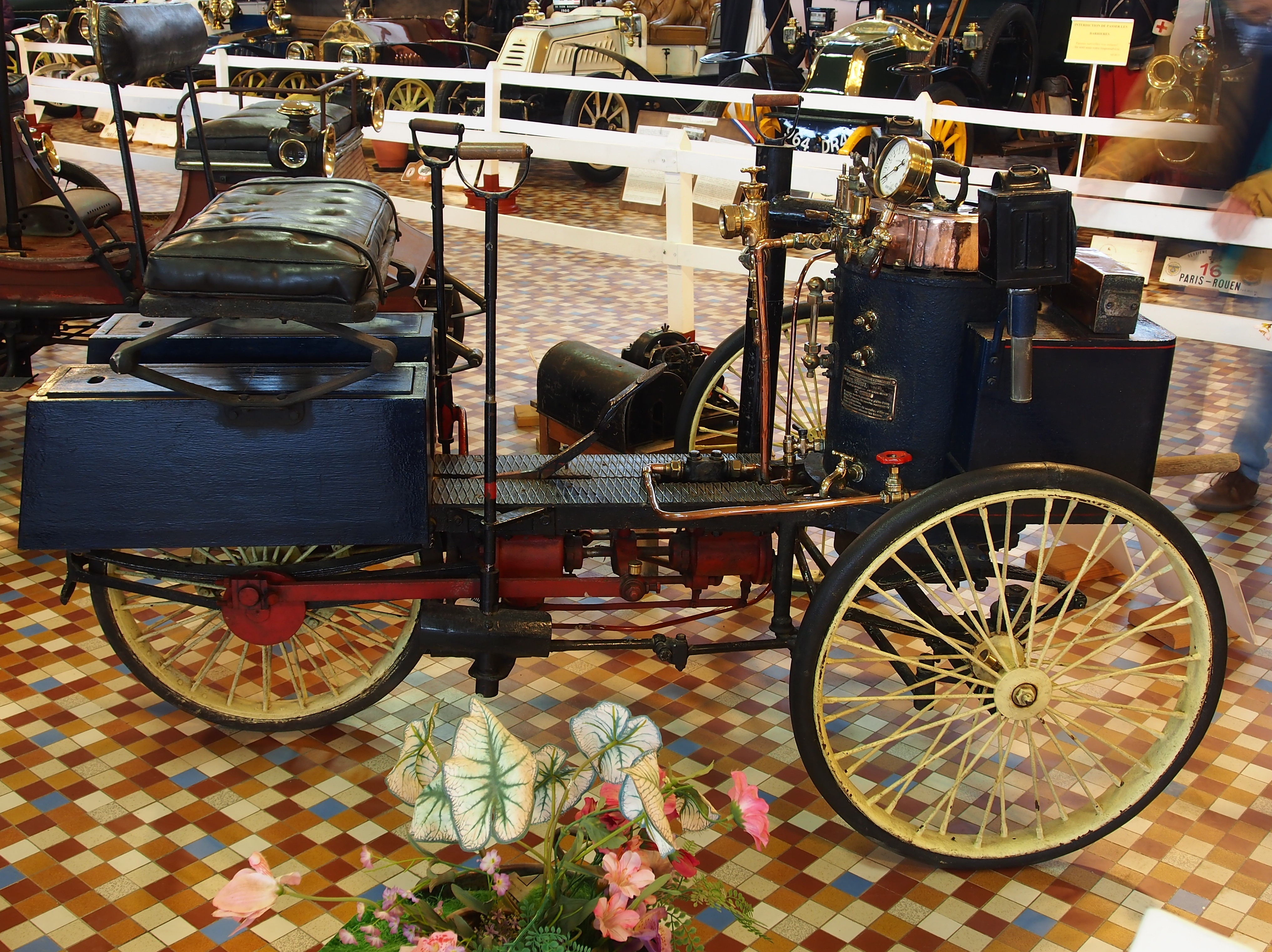 Photographed at the Musée Automobile de Vendée, France.